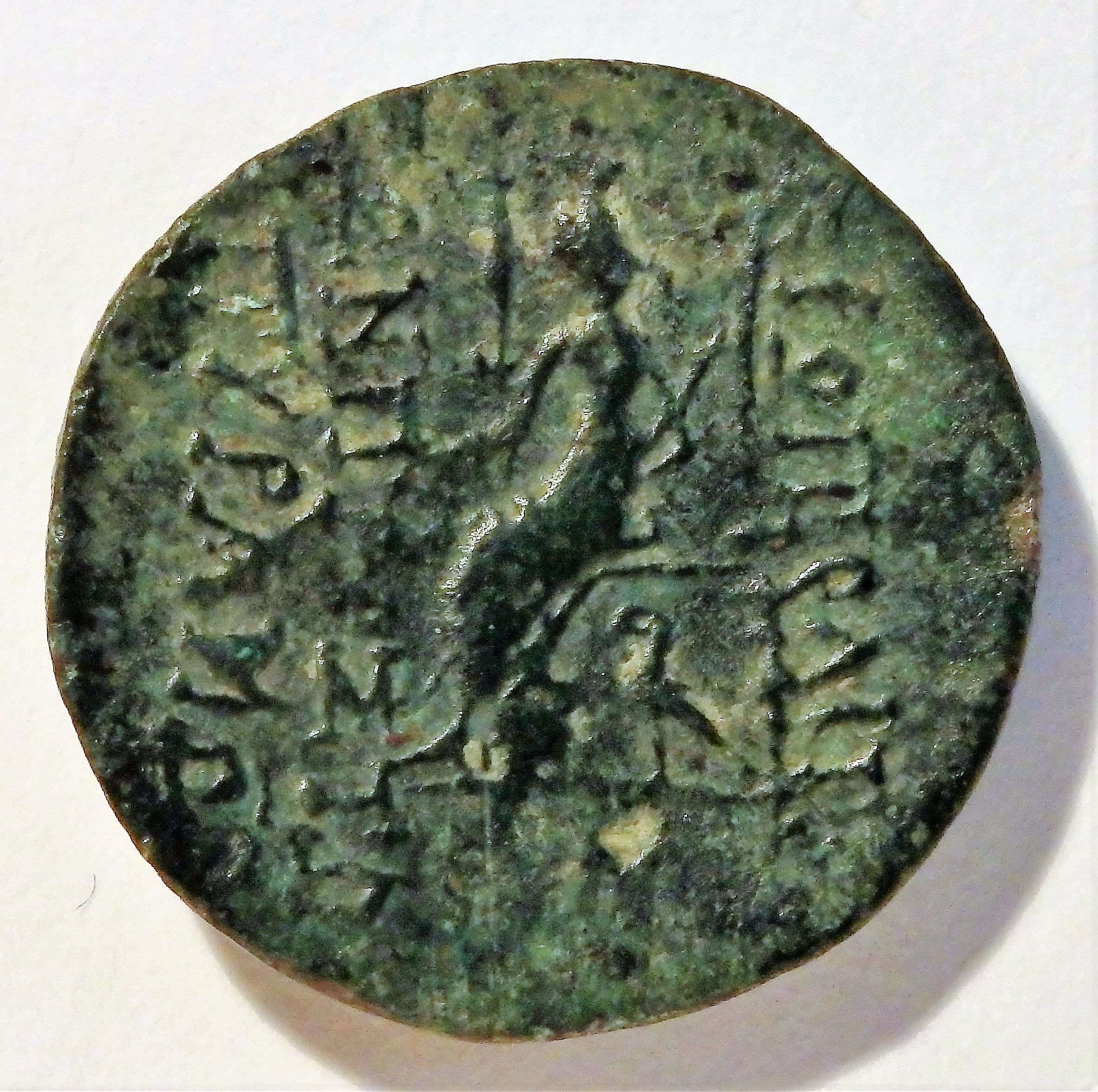 Rückseite der Münze mit Stadtgöttin mit Zepter, unter Thron Adler, Szaivert/Sear Nr. 5638